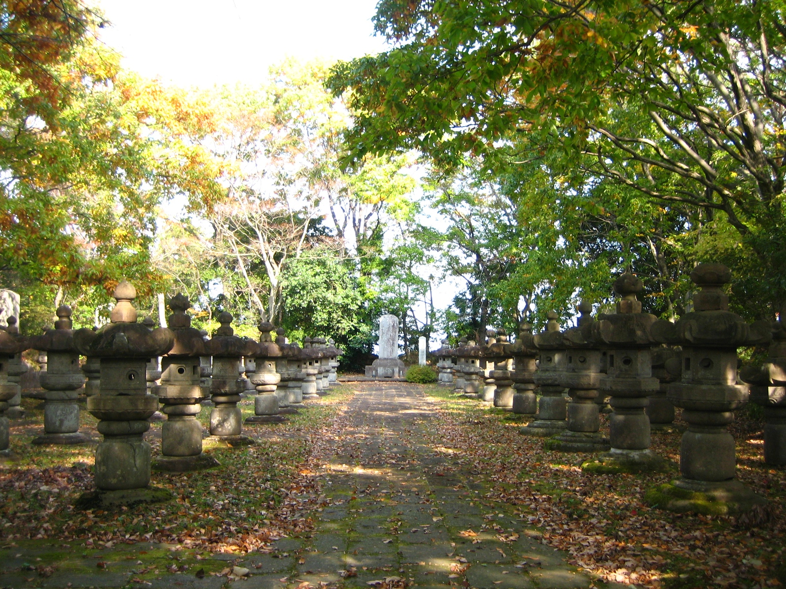 Dainenji Date Tomb(伊達家の墓所)